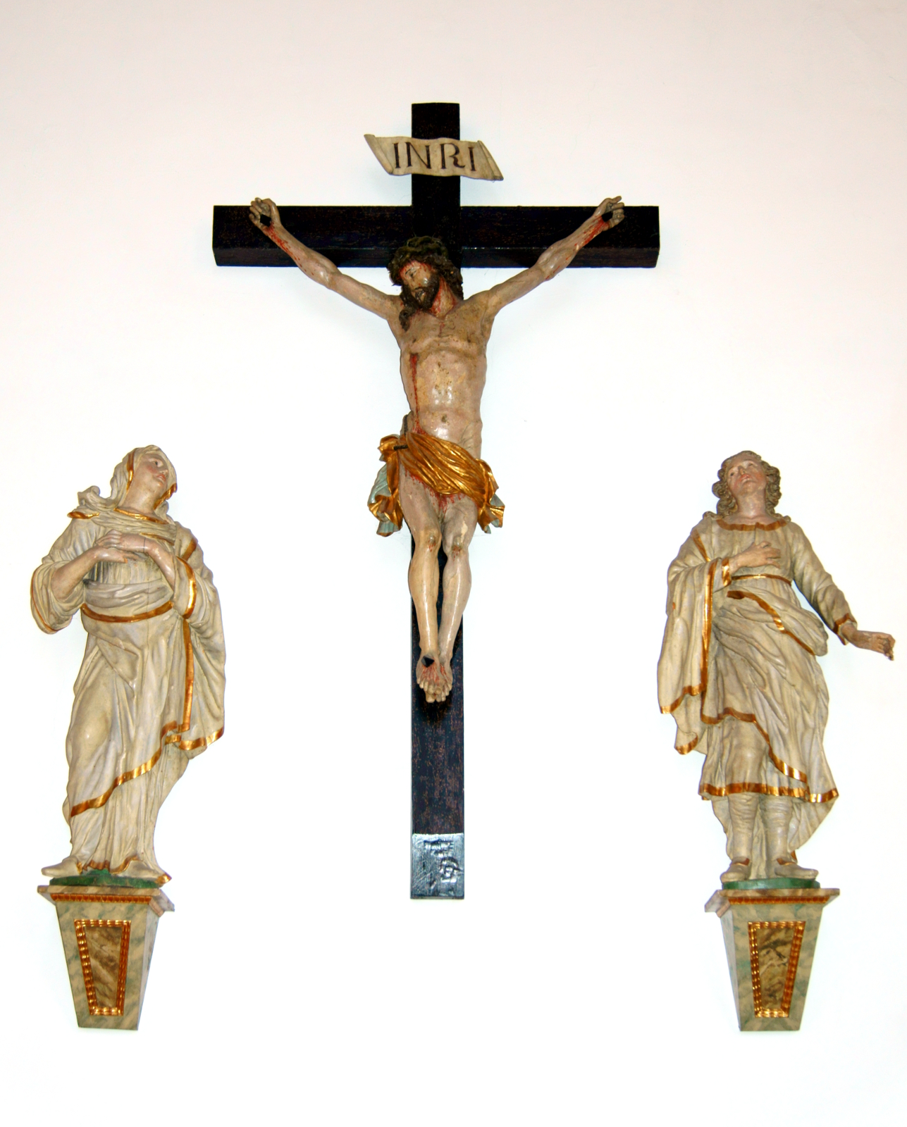 Die Kreuzigungsgruppe neben der Kanzel in der Burloer Kirche St. Marien stammt von einem ehemaligen Hochaltar (2. Hälfte des 18. Jahrhunderts). This is a photograph of an architectural monument. A1 - A 26